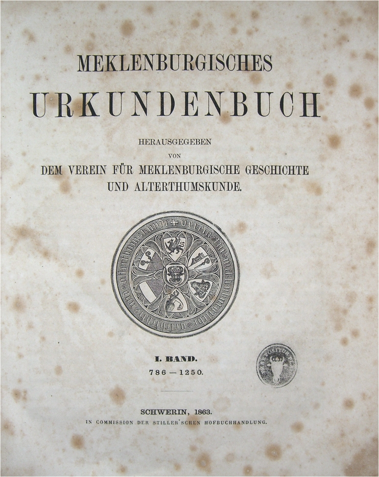 Mecklenburgisches Urkundenbuch, Titelseite des 1. Bandes 1863 mit Stempel des Vorbesitzers: PRAEPOSITUR PLAU